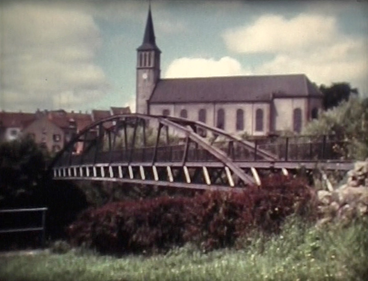 Brücke über die Saar und den Saarkanal, verbindet die Orte Kleinblittersdorf und Grosbliederstroff, Verwendung des ehemaligen Saarbrücker "Kummerstegs" von 1964 bis 1993, ab 1968 trägt sie den Namen "Freundschaftsbrücke".